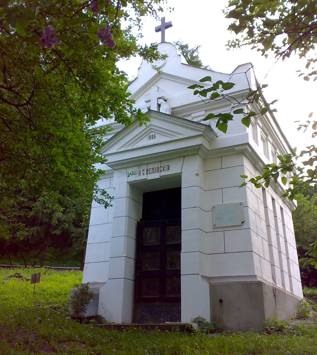 Склеп Лелявського